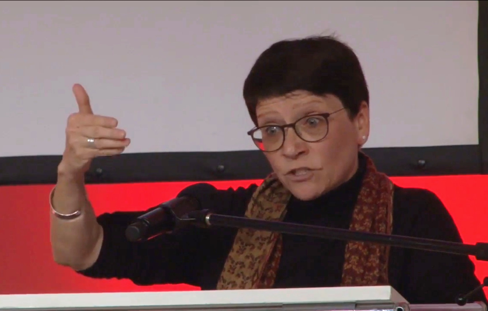 Livestream-Mitschnitt des Abendpodiums im Rahmen der 10. Marx-Herbstschule 2017: Der Begriff der Arbeit in Karl Marx' «Kapital» Berlin, 27.10.2017 Mehr Informationen